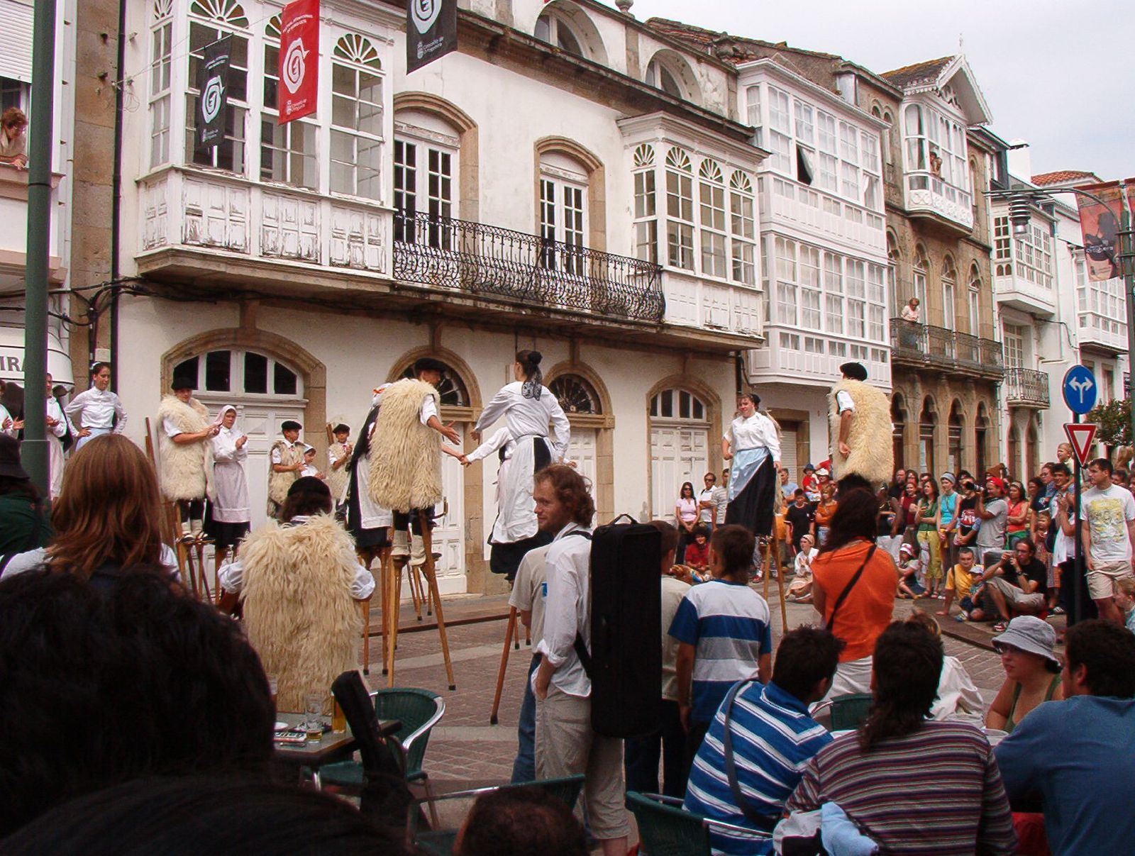 Xigantes durante o Festival da música celta de Ortigueira, Galiza